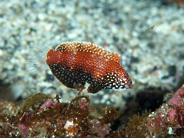 セジロノドグロベラ Macropharyngodon negrosensis